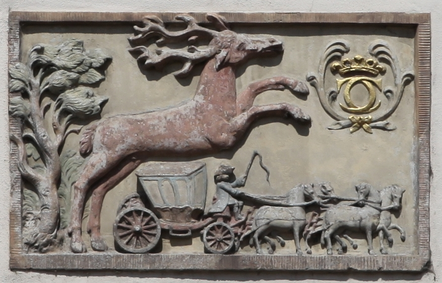 Kulturdenkmal Gasthof Torgauer Straße 40 in Eilenburg; Objektnummer: 08973291